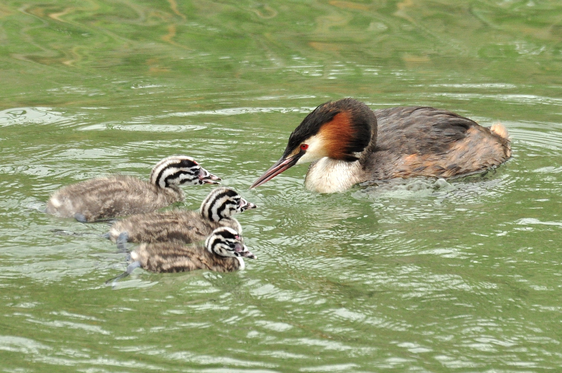 Podiceps cristatus on Obersee (upper Lake Zürich) respectively Seedamm and the wooden bridge (Holzbrücke) between Hurden and Rapperswil in Switzerland